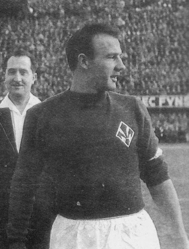 Firenze, stadio Comunale, fine degli anni 50 del XX secolo. Il capitano della Fiorentina, il difensore Sergio Cervato, prima del fischio d'inizio di una sfida contro la Juventus valevole per il campionato italiano di Serie A.